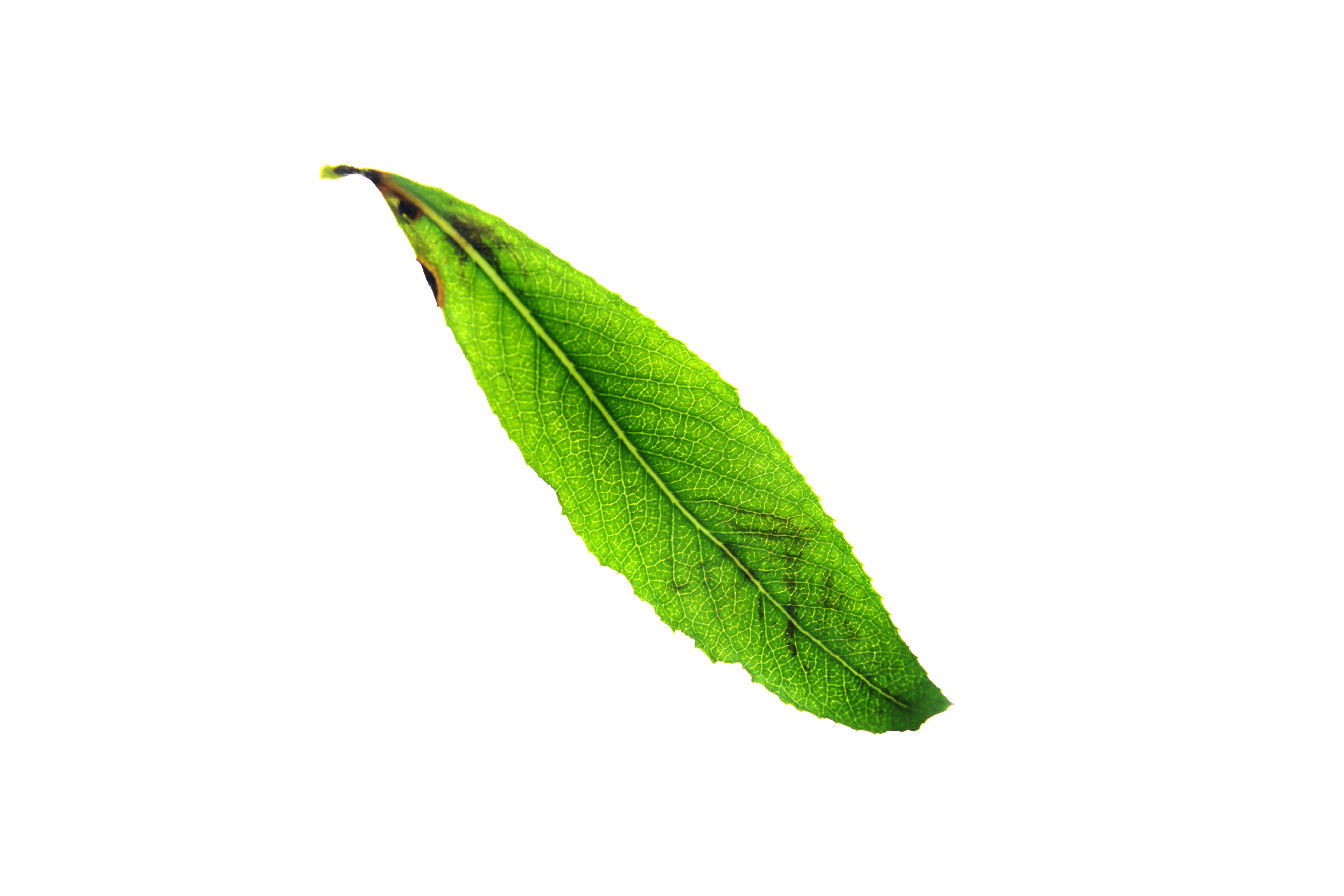 hoja de salix o sauce